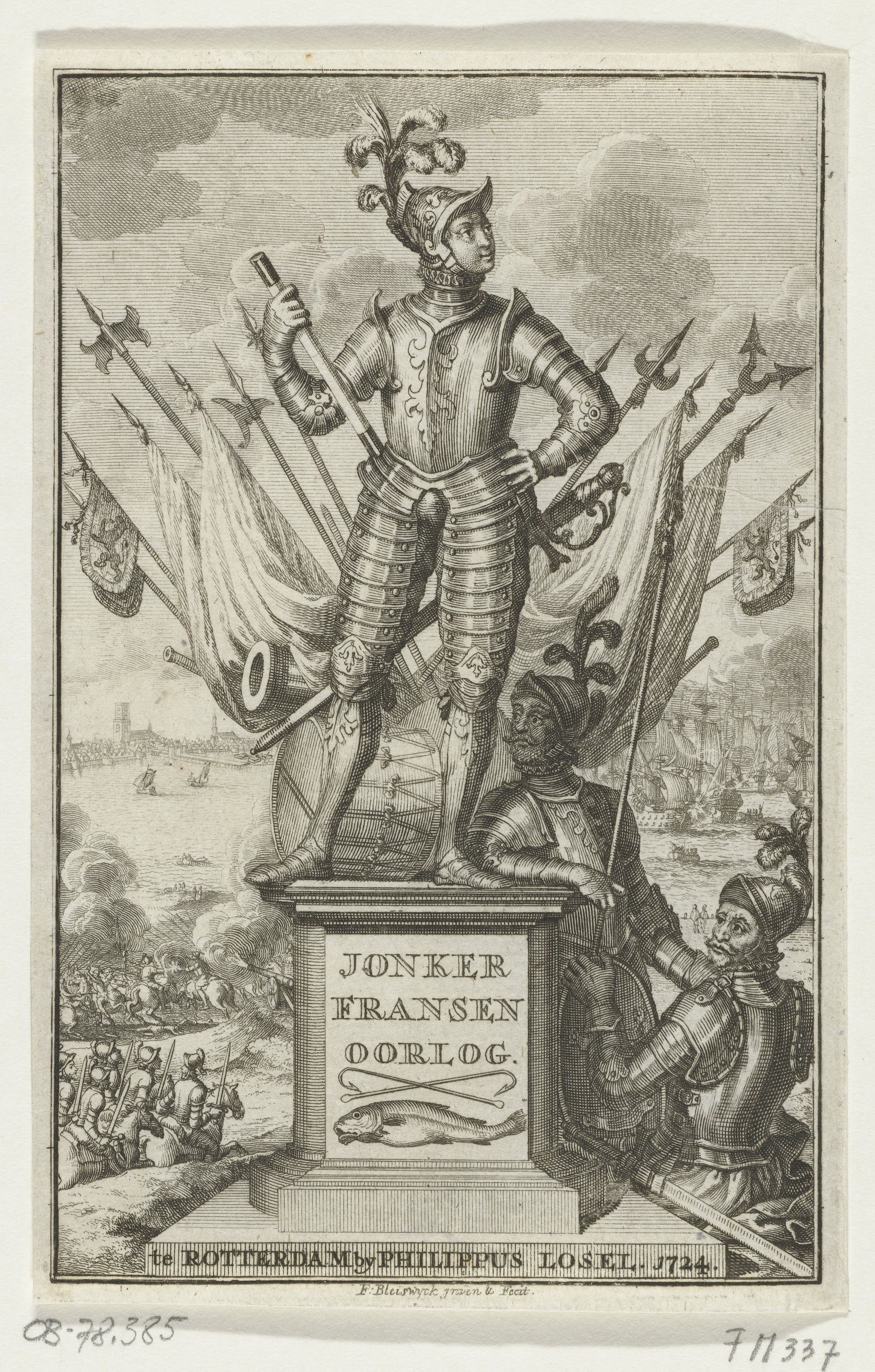 IdentificatieTitel(s): Titelprent voor C. van Alkemade, Jonker Fransen OorlogJonker Fransen oorlog (titel op object)Objecttype: prent historieprent titelprent Objectnummer: RP-P-OB-78.385Catalogusreferentie: FMH 337Omschrijving: Jonker Frans van Brederode staande op een voetstuk, op de achtergrond strijdtaferelen.VervaardigingVervaardiger: prentmaker: François van Bleyswijck (vermeld op object)naar eigen ontwerp van: François van Bleyswijck (vermeld op object)uitgever: Philippus Losel (vermeld op object)Plaats vervaardiging: prentmaker: Noordelijke Nederlandenuitgever: RotterdamDatering: 1724Fysieke kenmerken: etsMateriaal: papier Techniek: etsenAfmetingen: papier: h 153 mm × b 100 mmToelichtingIllustratie voor: C. van Alkemade, Rotterdamse heldendaden onder de stadvoogdy van (...) Frans van Brederode, genaamt jonker Fransen oorlog, P. Losel, Rotterdam 1724.OnderwerpWat: Hoekse en Kabeljauwse twistenWanneer: 1488 - 1488Waar: RotterdamWie: Jonker Frans van BrederodeVerwerving en rechtenVerwerving: aankoop 1881Copyright: Publiek domein